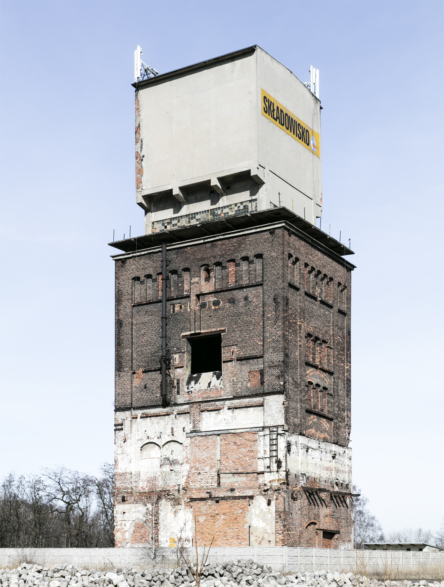 KWK Wałbrzych Schacht Staszic